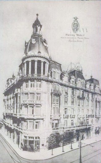 Edificio del Savoy Hotel en la esquina de la Avenida Callao y Cangallo (hoy Perón) en la ciudad de Buenos Aires.